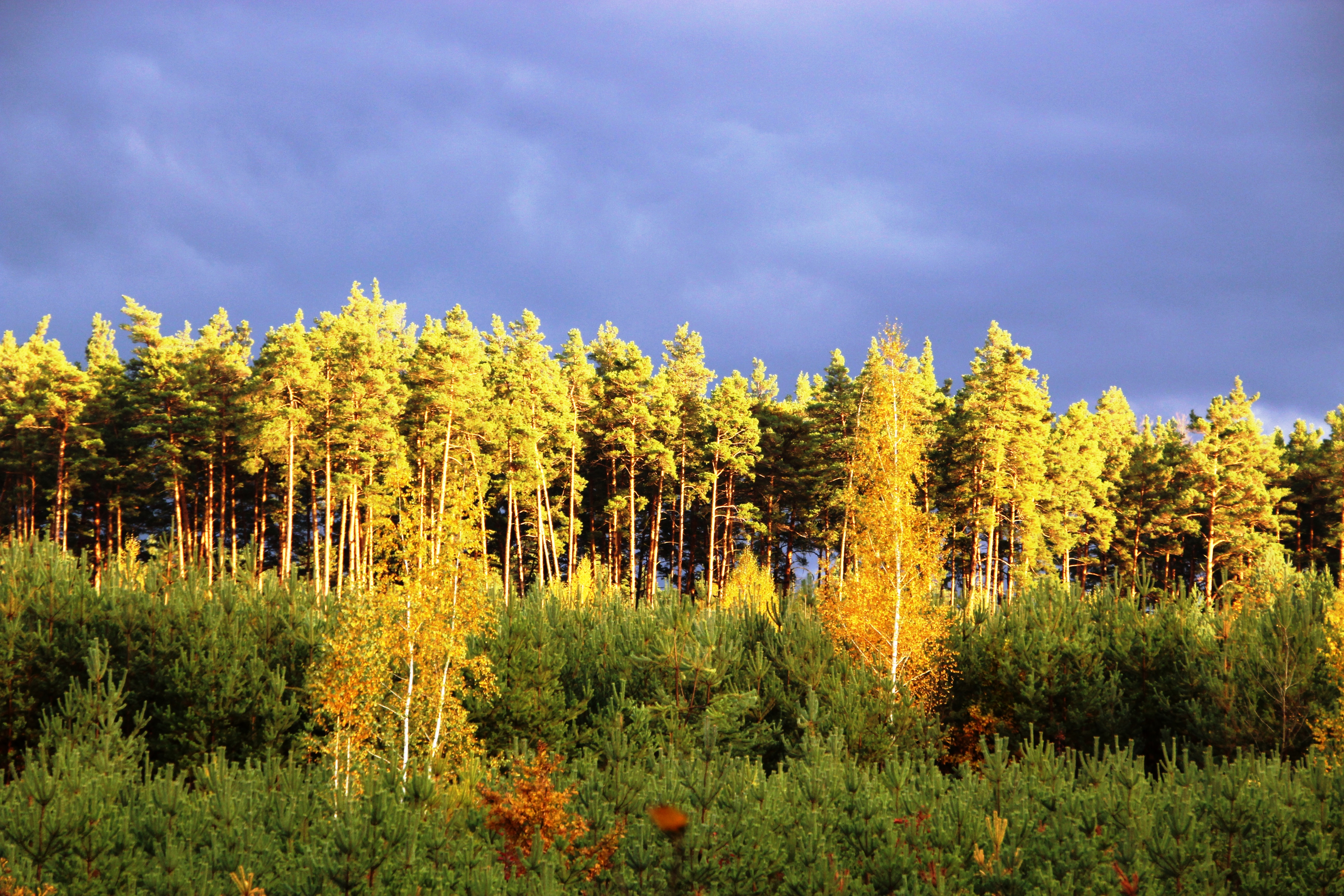 Золота осінь, осінній ліс